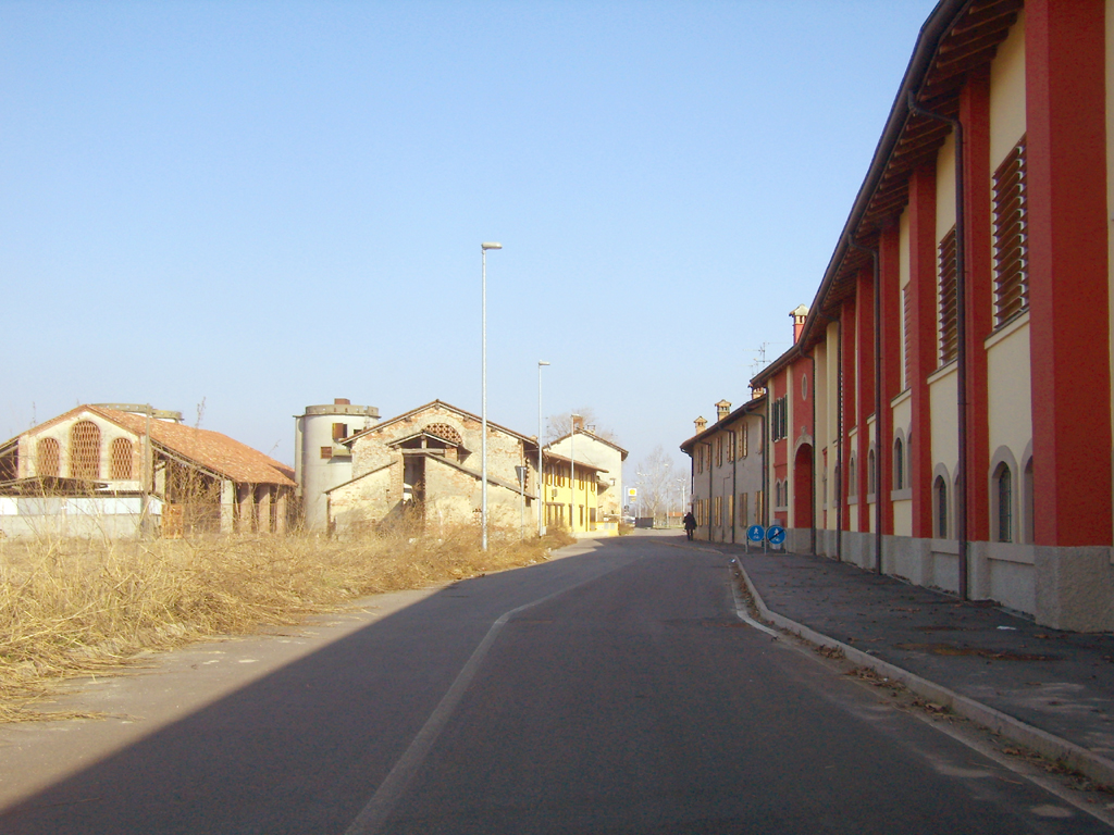 Via Padre Kolbe a Sesto, località nel comune di San Martino in Strada.